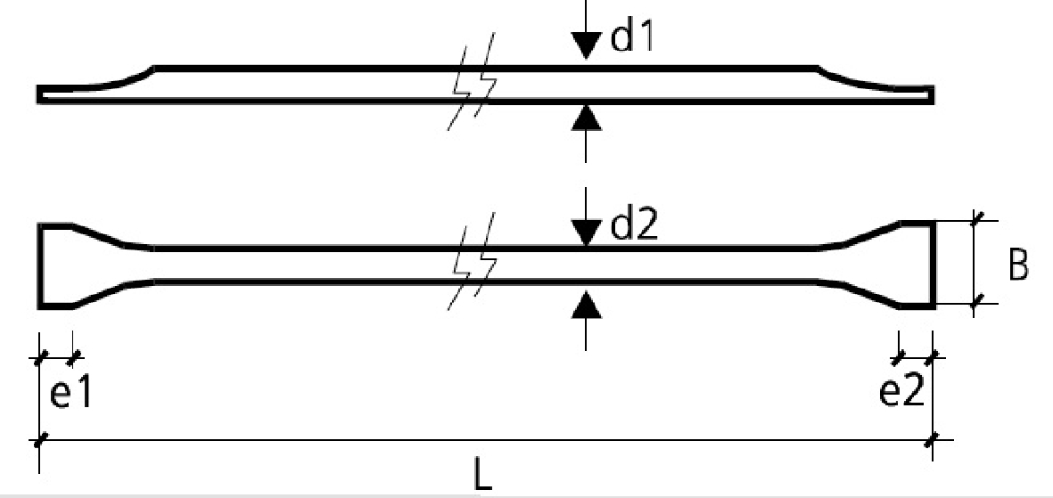 Stahlfasern (getauchte Form)